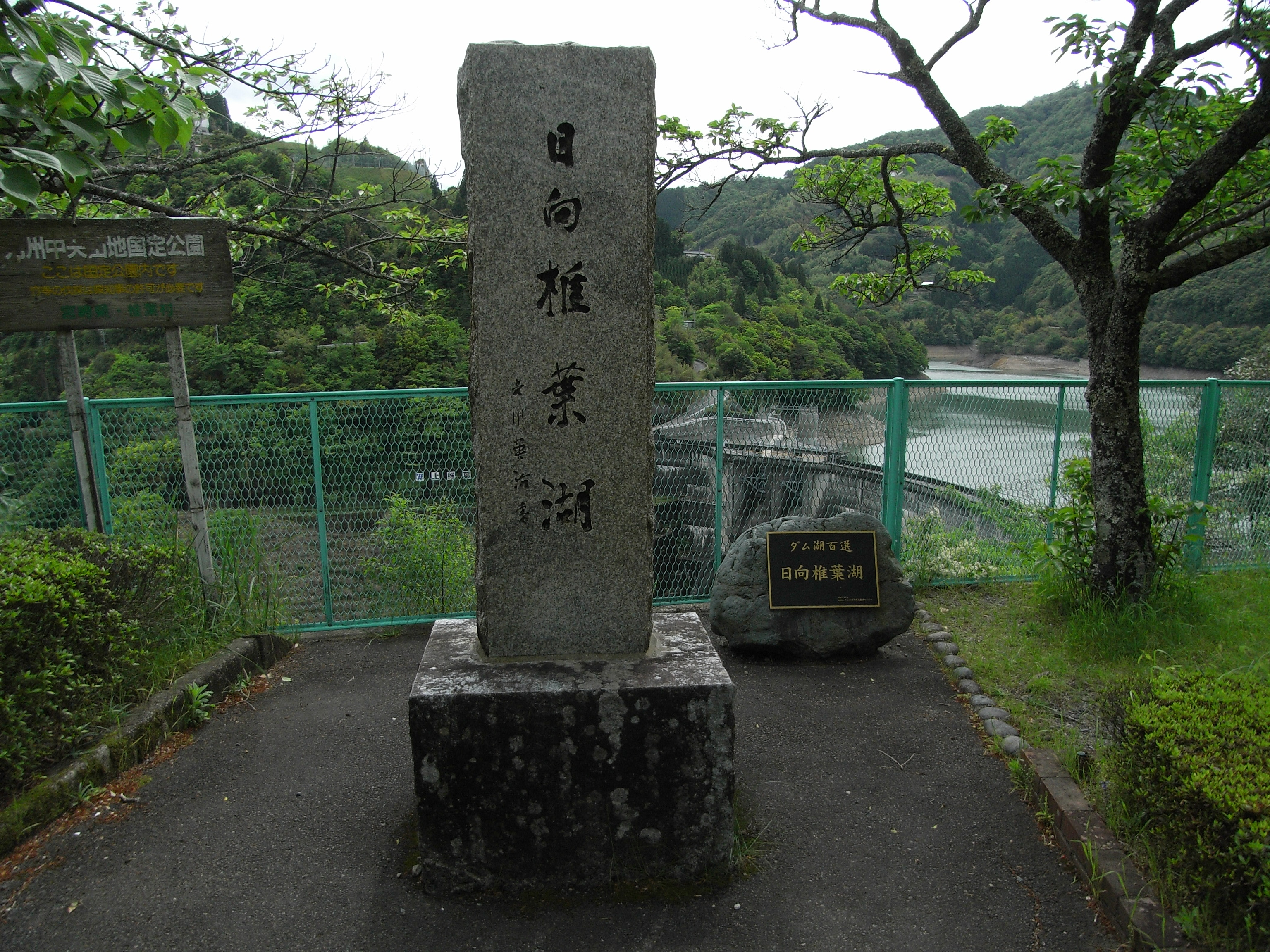 Lake